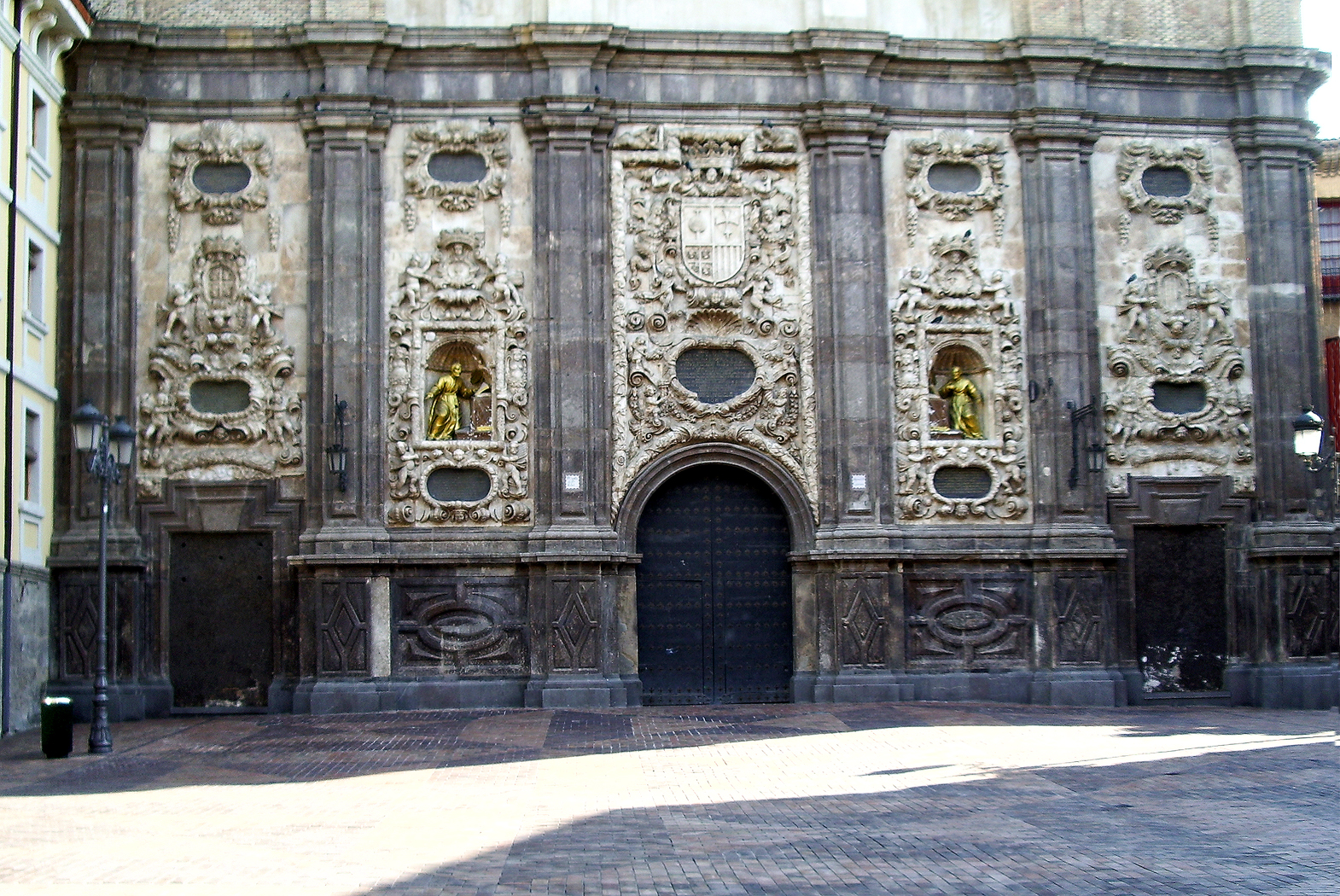 Fachada de la Iglesia de Santa Isabel de Portugal (Zaragoza, España)